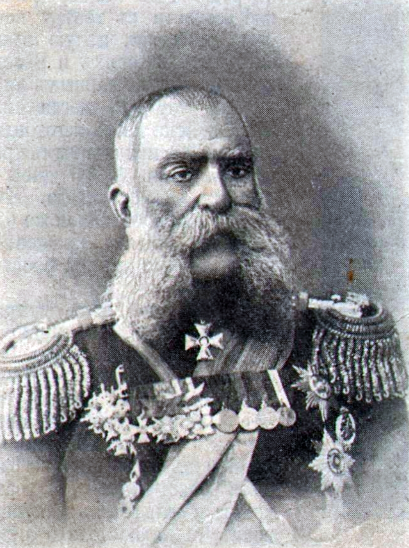 Амилахори, Иван Гивич